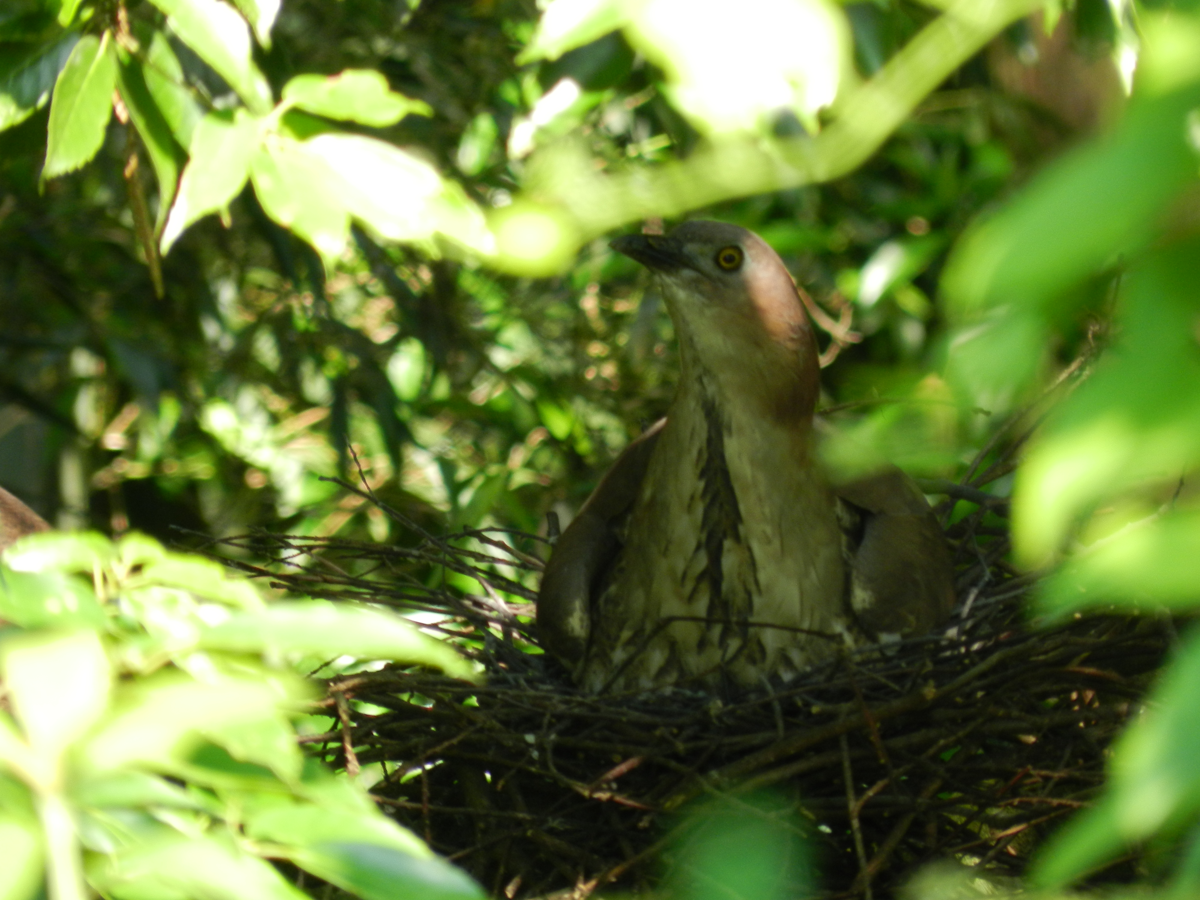 ミゾゴイ営巣中の様子